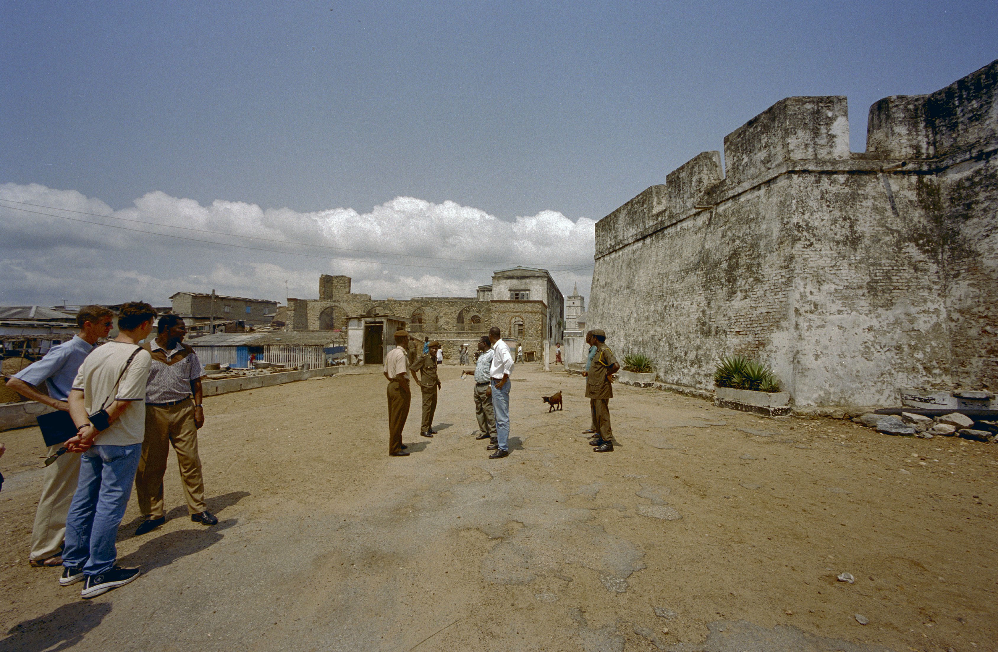 Fort William: Overzicht gevel bastion (opmerking: Ghana reis Loek Tangel)